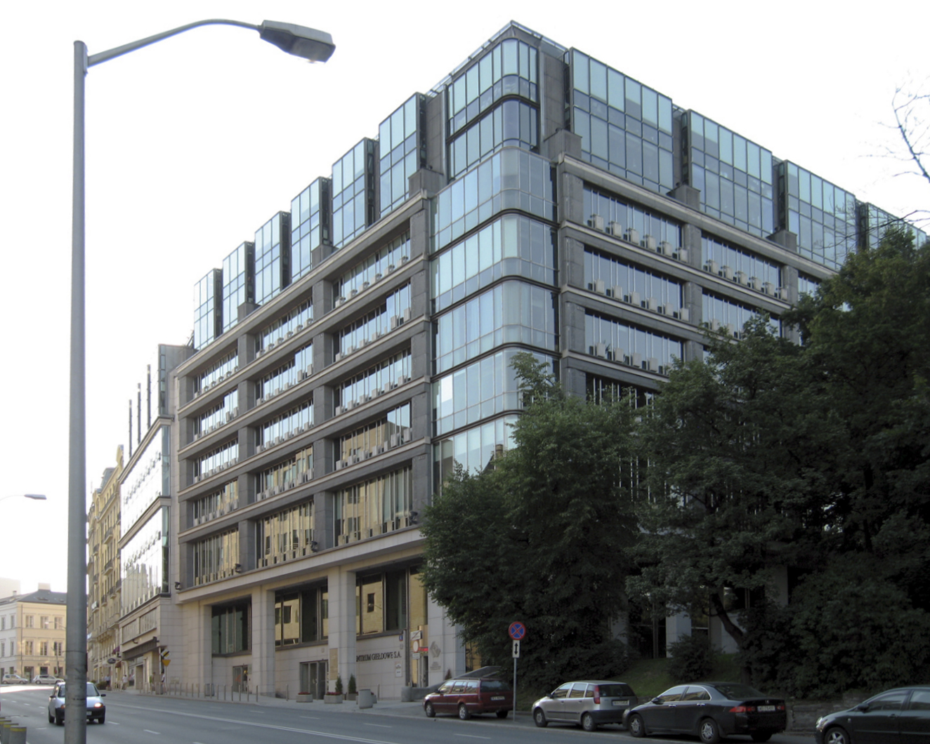 Budynek Giełdy Papierów Wartościowych w Warszawie